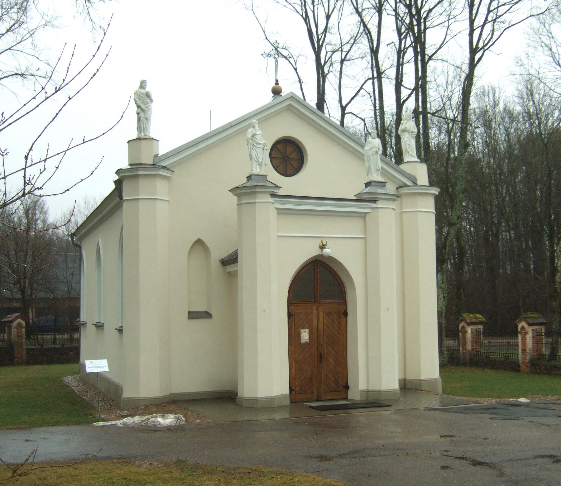 Trakų Vokės dvaro sodybos koplyčia-mauzoliejus; manoma, projekto autorius architektas Leandras Markonis (Leandro Jan Marconi, 1834-1919), eksterjero restauracijos projekto autorius architektas Alfonsas Lagunavičius, interjerų – Valentinas Vileikis; Manoma arch. L.Markoni. Stilius: istorizmas, neogotika